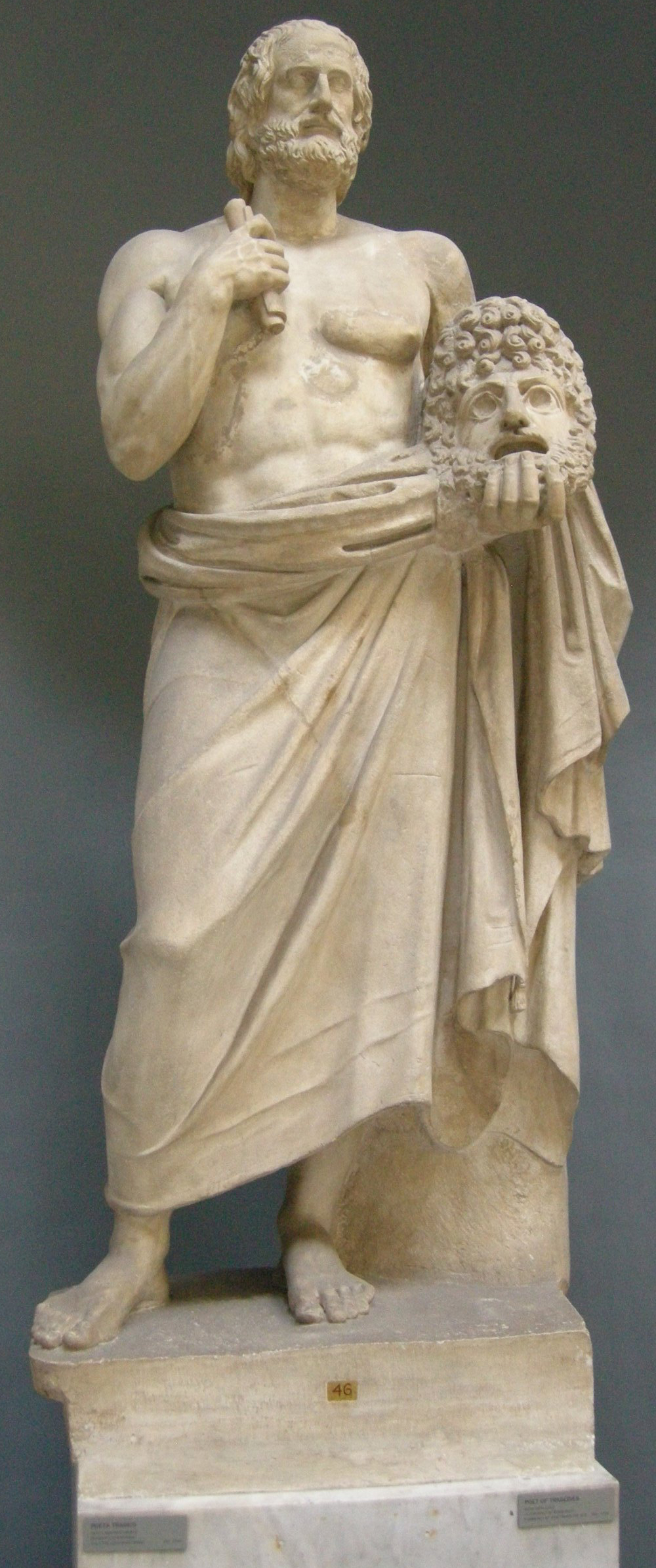 Poeta tragico con testa non pertinente di euripide, inv. 2266. Museo Chiaramonti.